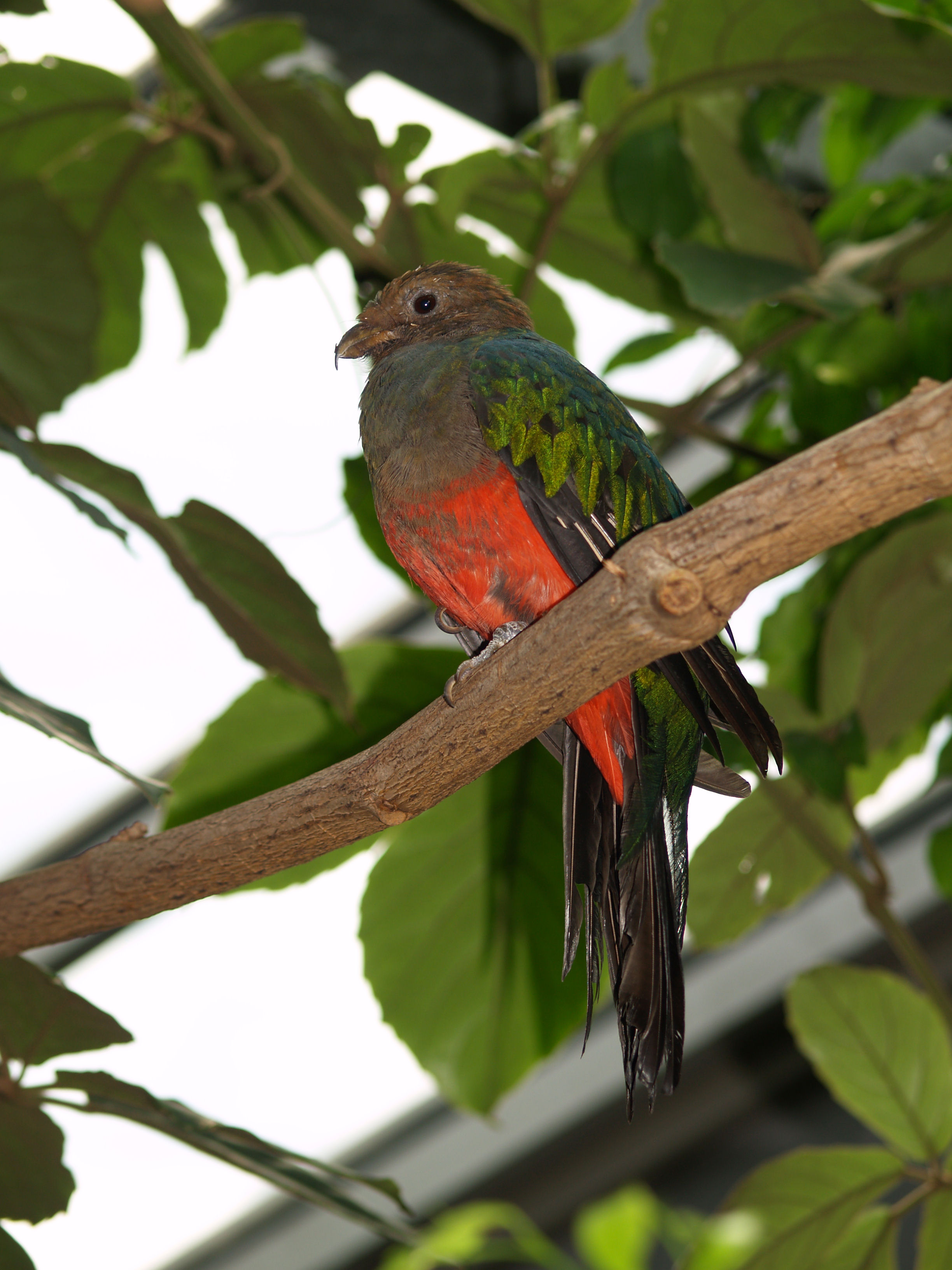 Ein Goldkopftrogon (Pharomachrus auriceps). Aufgenommen im Zoo Zürich.